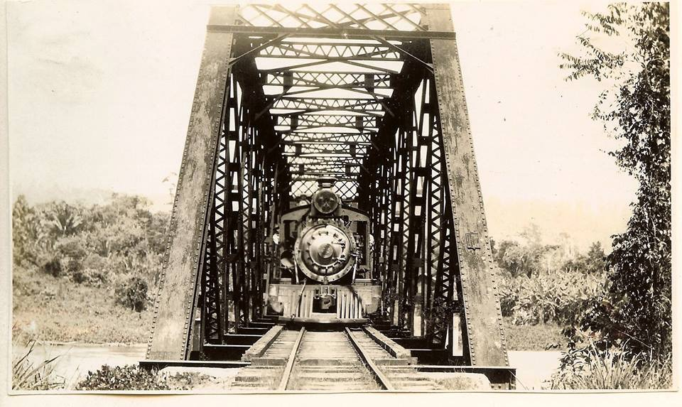 Ferrocarril de Norte de Guatemala